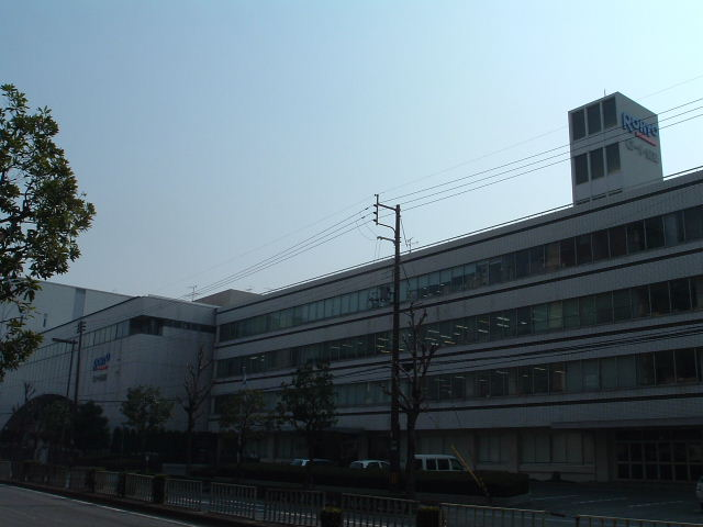 ロート製薬本社外観